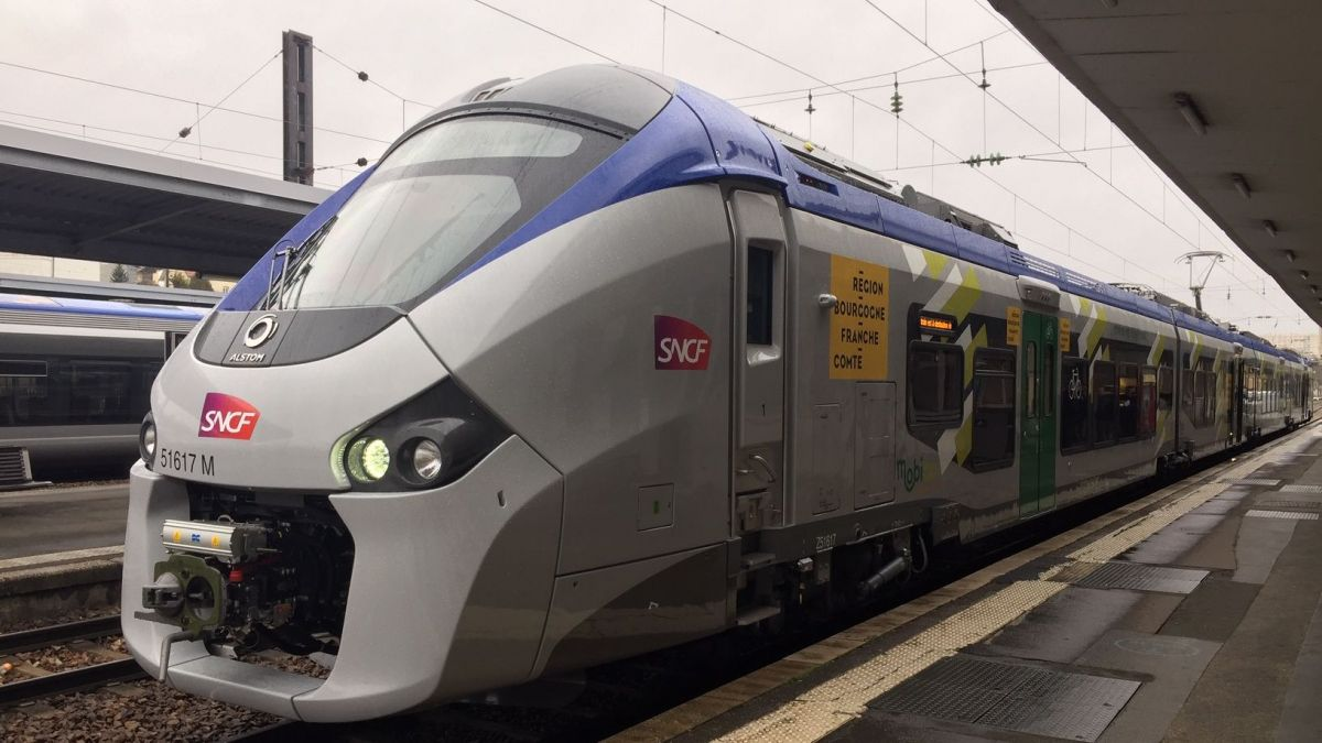 Un Régiolis (Z51500) en gare de Besançon-Viotte aux couleurs de la région Bourgogne-Franche-Comté